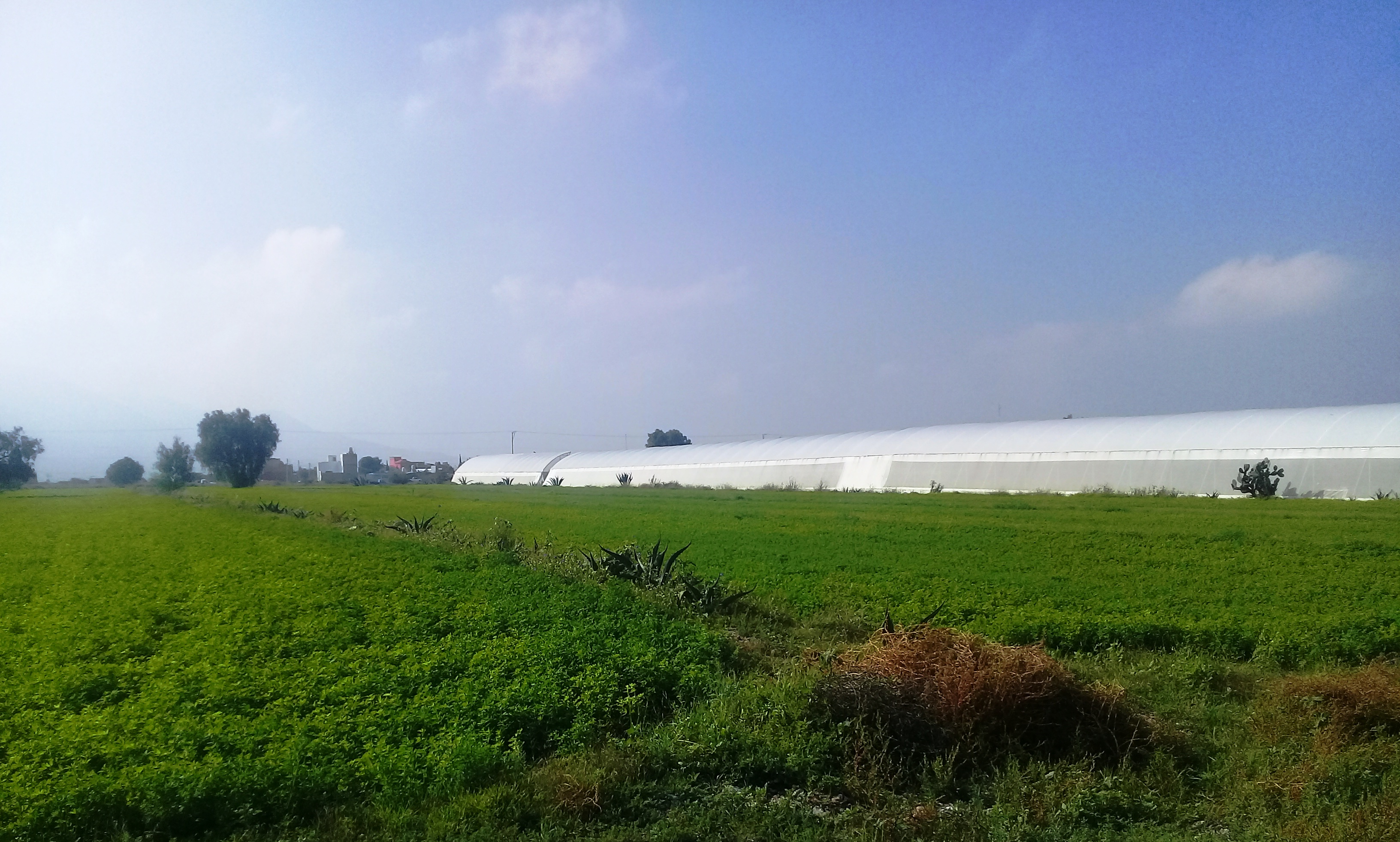 Cultivo e invernaderos en Actopan, Hidalgo.